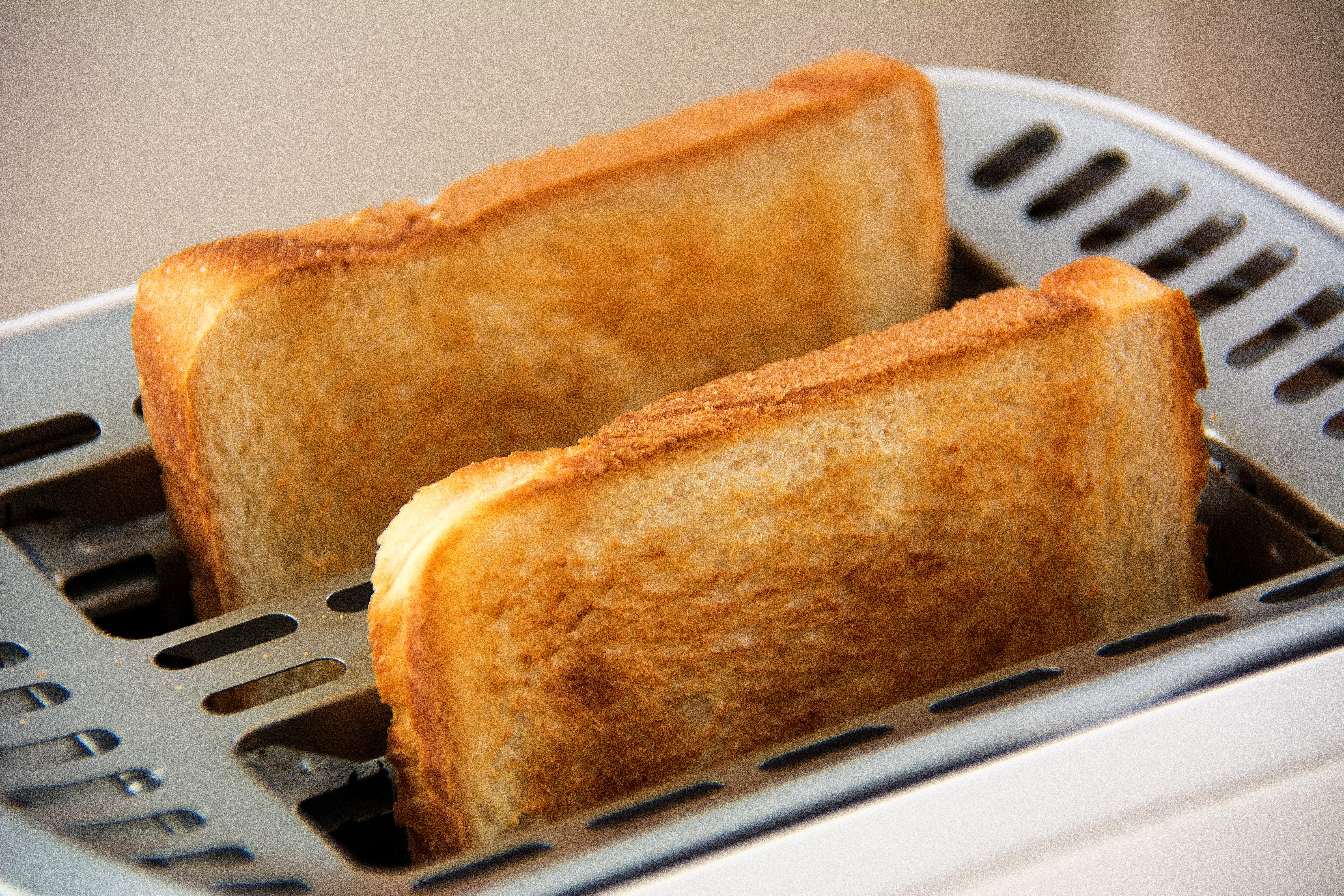 Making toasts